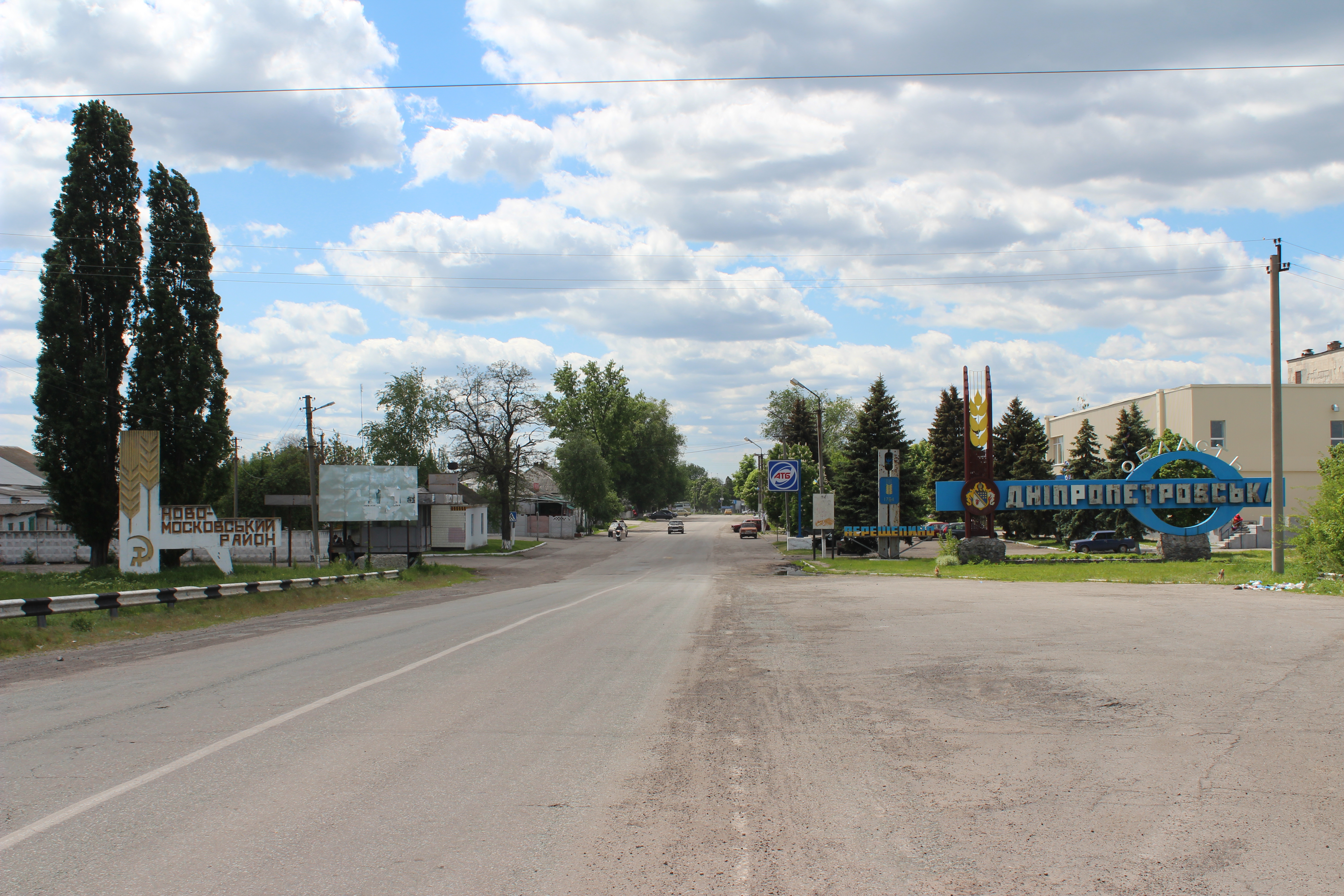 Північний в'їзд до міста